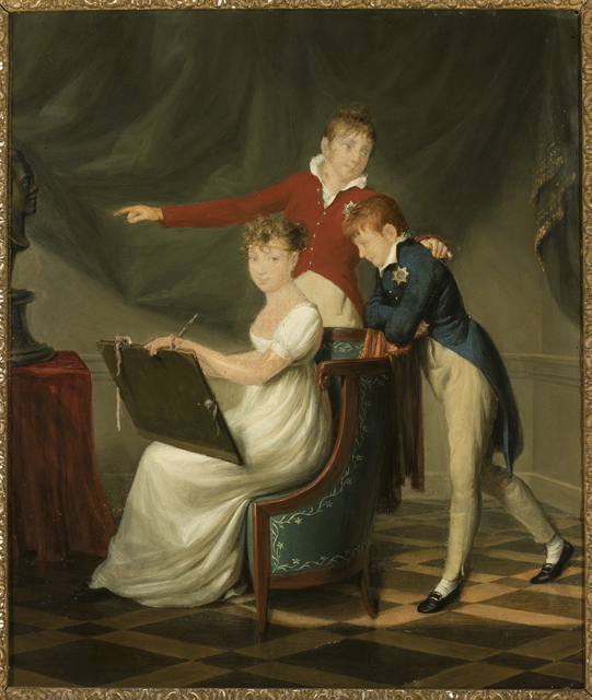 Portret van koningin Anna Paulowna (1795-1865), tsaar Nicolaas I Romanov (1796-1855) en Michael Romanov (1798-1849) als kinderen // Stichting Historische Verzamelingen van het Huis Oranje-Nassau, Den Haag // 27 x 24 cm op Paleis Soestdijk, nr. 511 Van de kunstzinnige aanleg van Anna Paulowna getuigt een aantal kunstwerken, bewaard gebleven in de Koninklijke Verzamelingen. Als gebruikelijk voor dochters uit vorstelijke families ving voor Anna al op jonge leeftijd het kunstonderwijs aan. Hier zien we de 11-jarige Anna met tekenmap en pen omgeven door twee van haar broers, de grootvorsten Nicolaas (tsaar van 1825-1855) en Michaël.